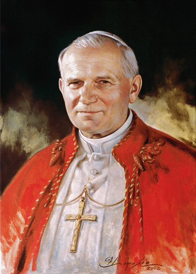 Ritratto di Papa Giovanni Paolo II, opera di Giuseppe Antonio Lomuscio